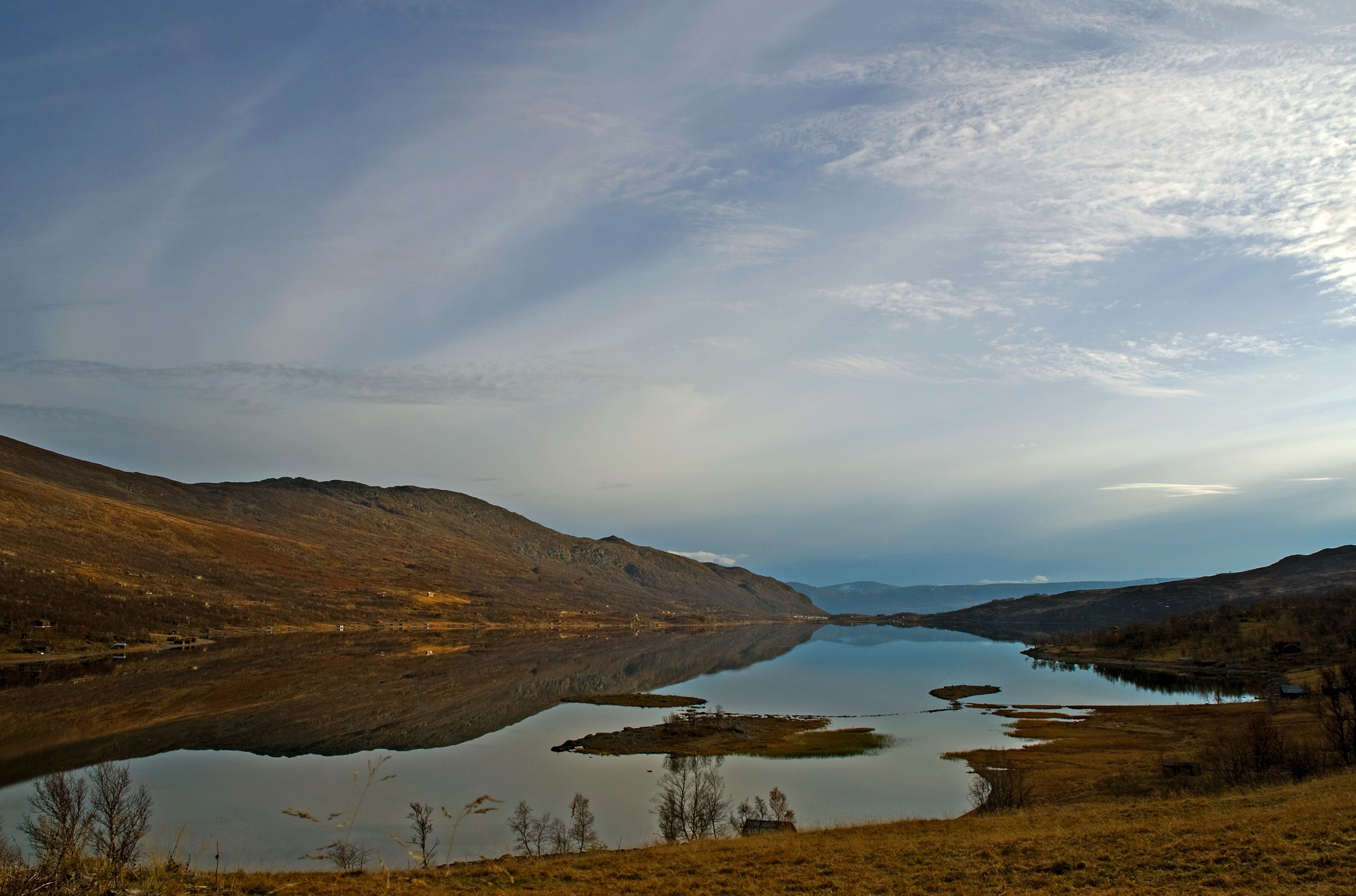 Foto av Skarvatnet i Oppdal fotografert fra nordnordvest mot Oppdal